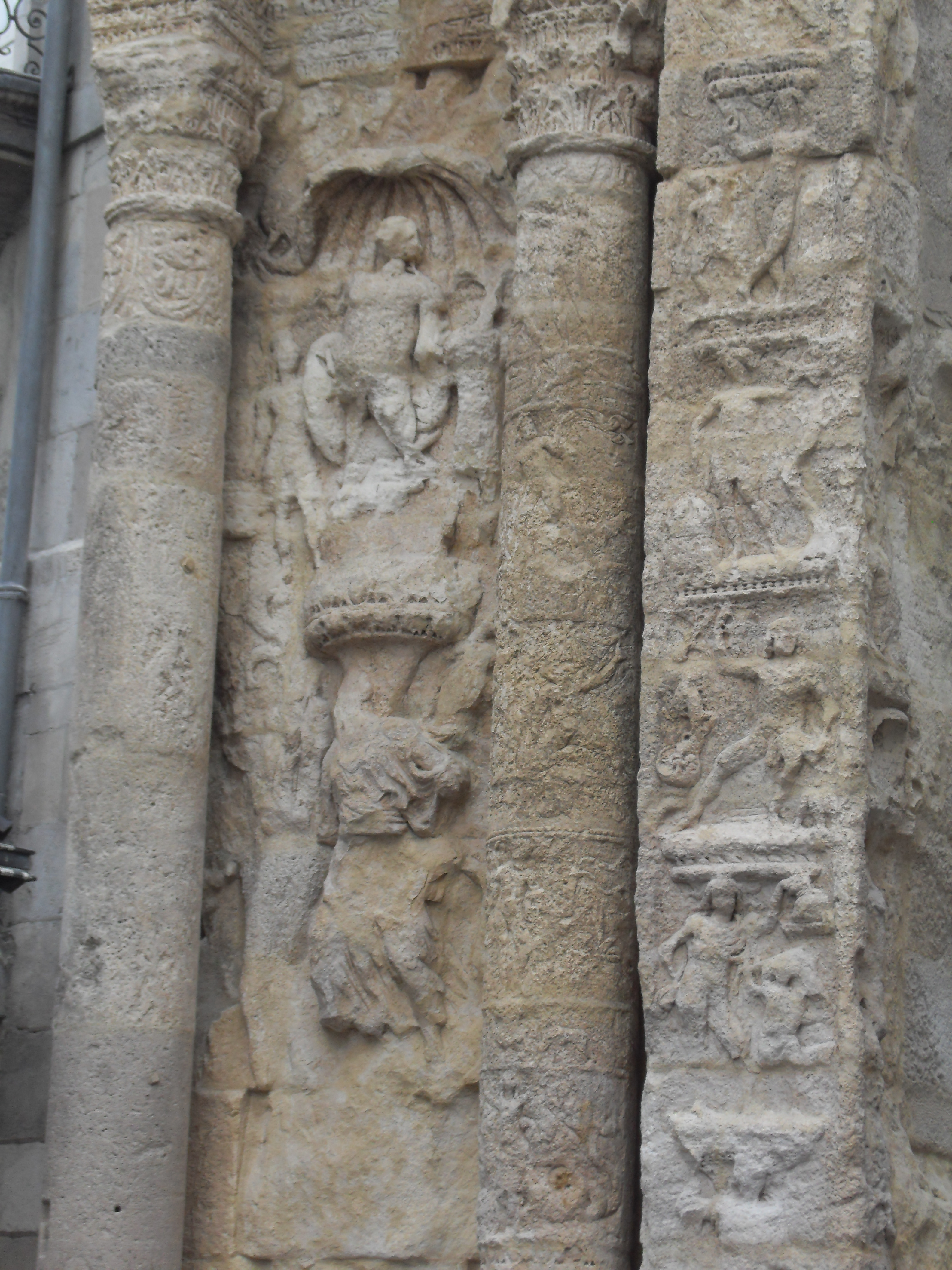 Vue détaillée de la Porte Noire de Besançon : piédroit Est, étage inférieur. Représentation de la déesse Vénus et du Dieu Mars.